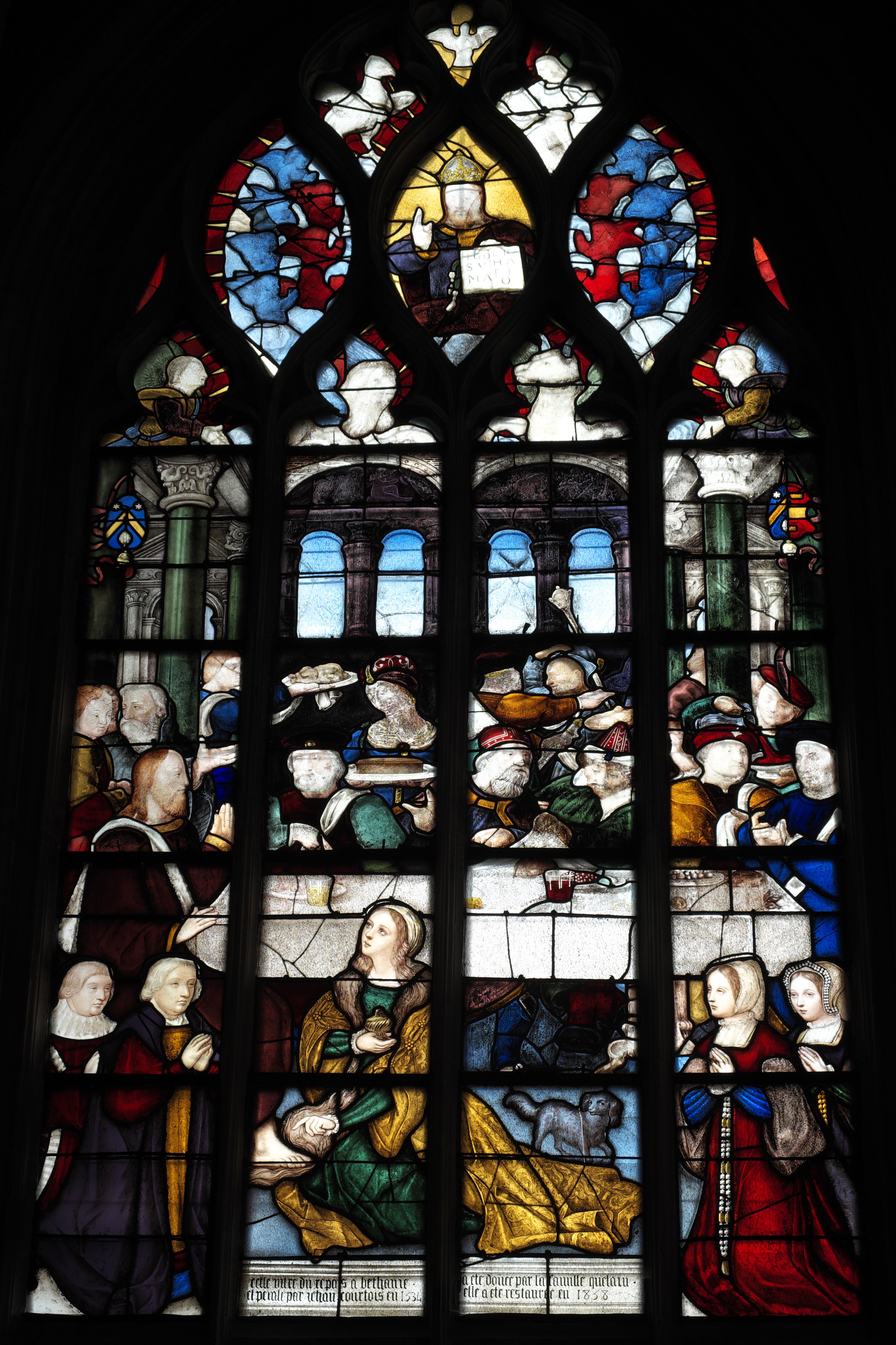 Katholische Pfarrkirche Notre-Dame-des-Marais in La Ferté-Bernard im Département Sarthe (Pays de la Loire/Frankreich), Bleiglasfenster (baie 5) von 1534, von Jean Courtois, 1858 restauriert; Darstellung: Gastmahl im Hause des Simon